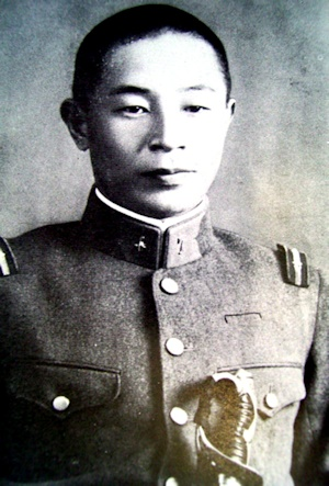 Il tenente Hisashi Kono, componente dei militari ribelli in Giappone il 26 febbraio 1936